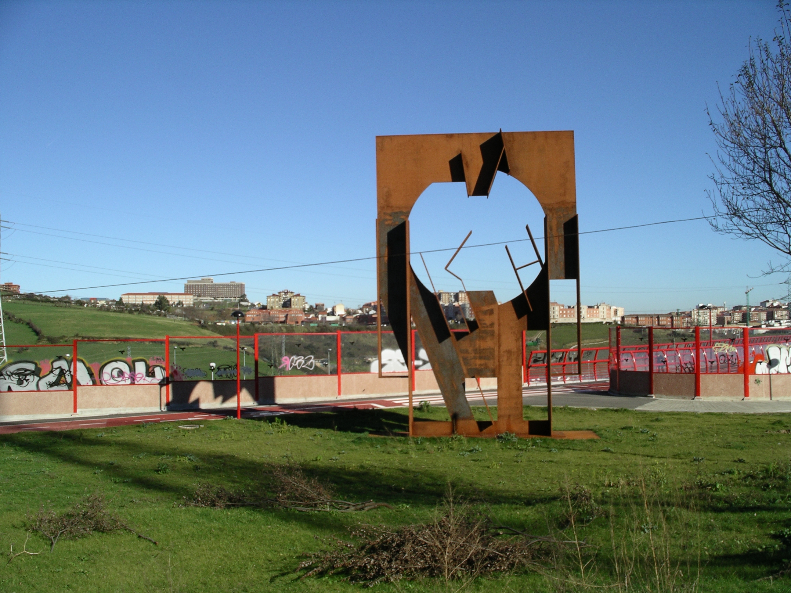 Nestor Basterretxea Artzadun artistaren eskultura, Basorin (Urtuella), Meatzaldea, Bizkaia.